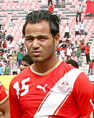 Zouhaier Dhaouadi, joueur tunisien de football